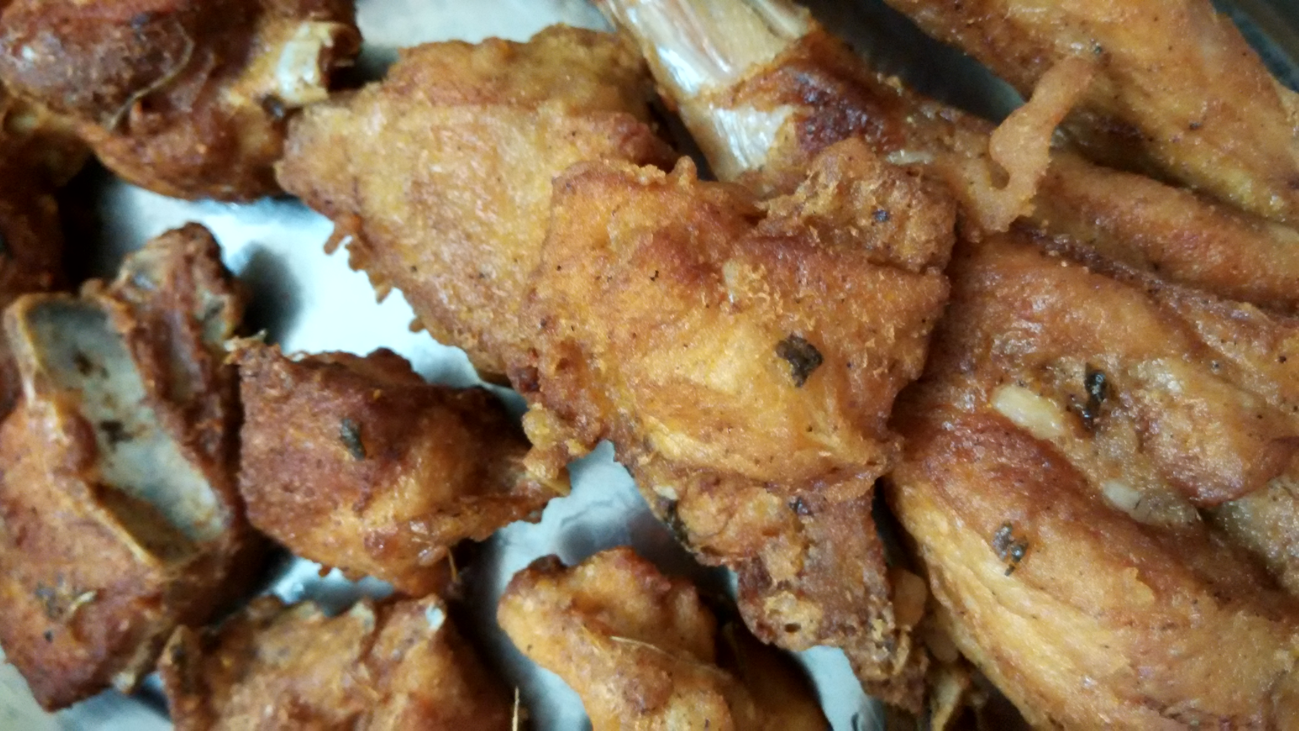 கோழிக்கறி வருவல்